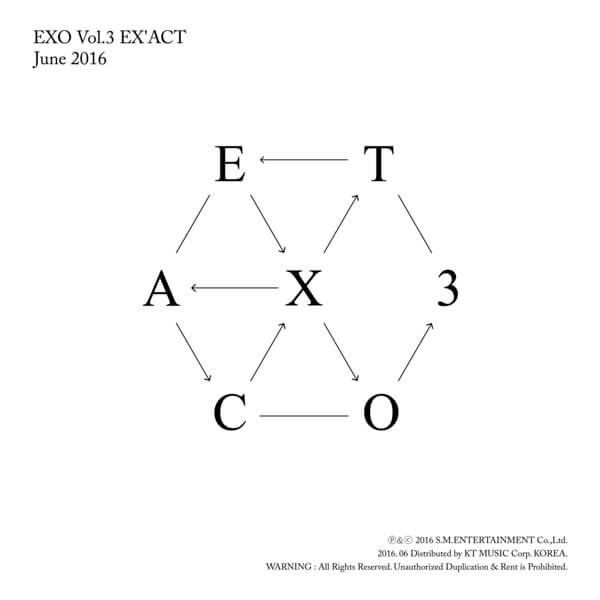 EXO-EXACT-The-3rd-Album